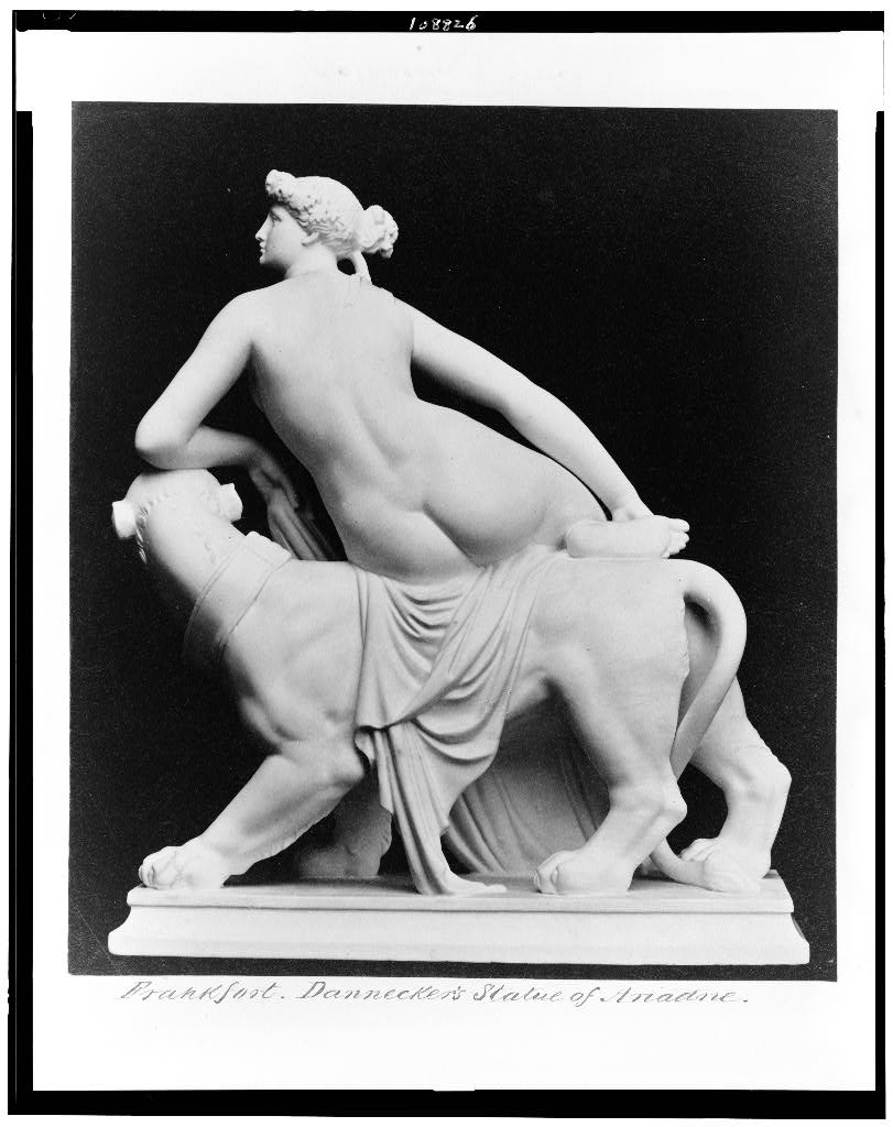 Statue der Ariadne von Johann Heinrich von Dannecker (1758-1841), Frankfurt am Main, Liebieghaus. 1816 durch Simon Moritz von Bethmann erworben und im Ariadneum ausgestellt.